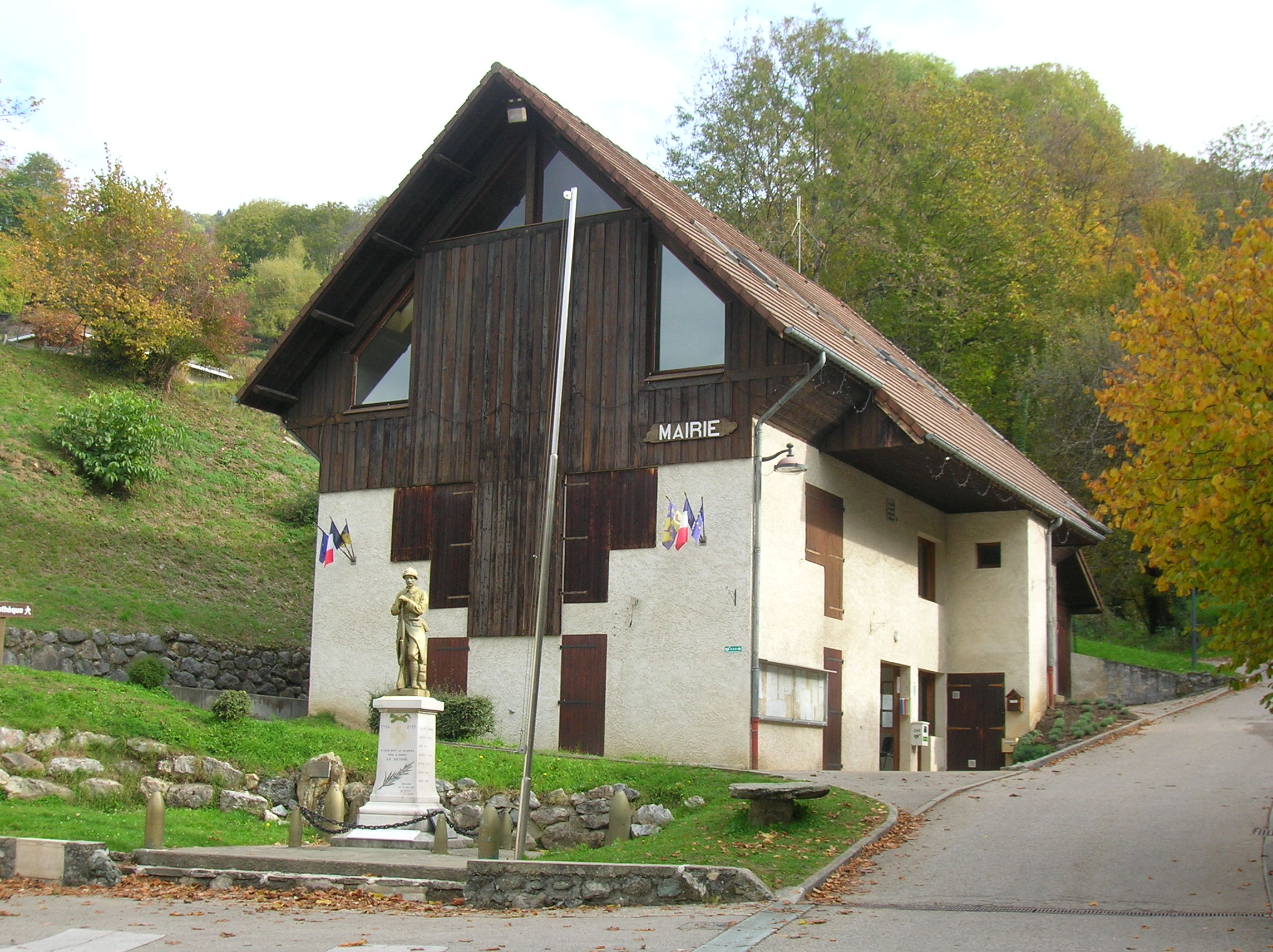 mairie Hameau La Chapelle, La Combe-de-Lancey, Isère, France.